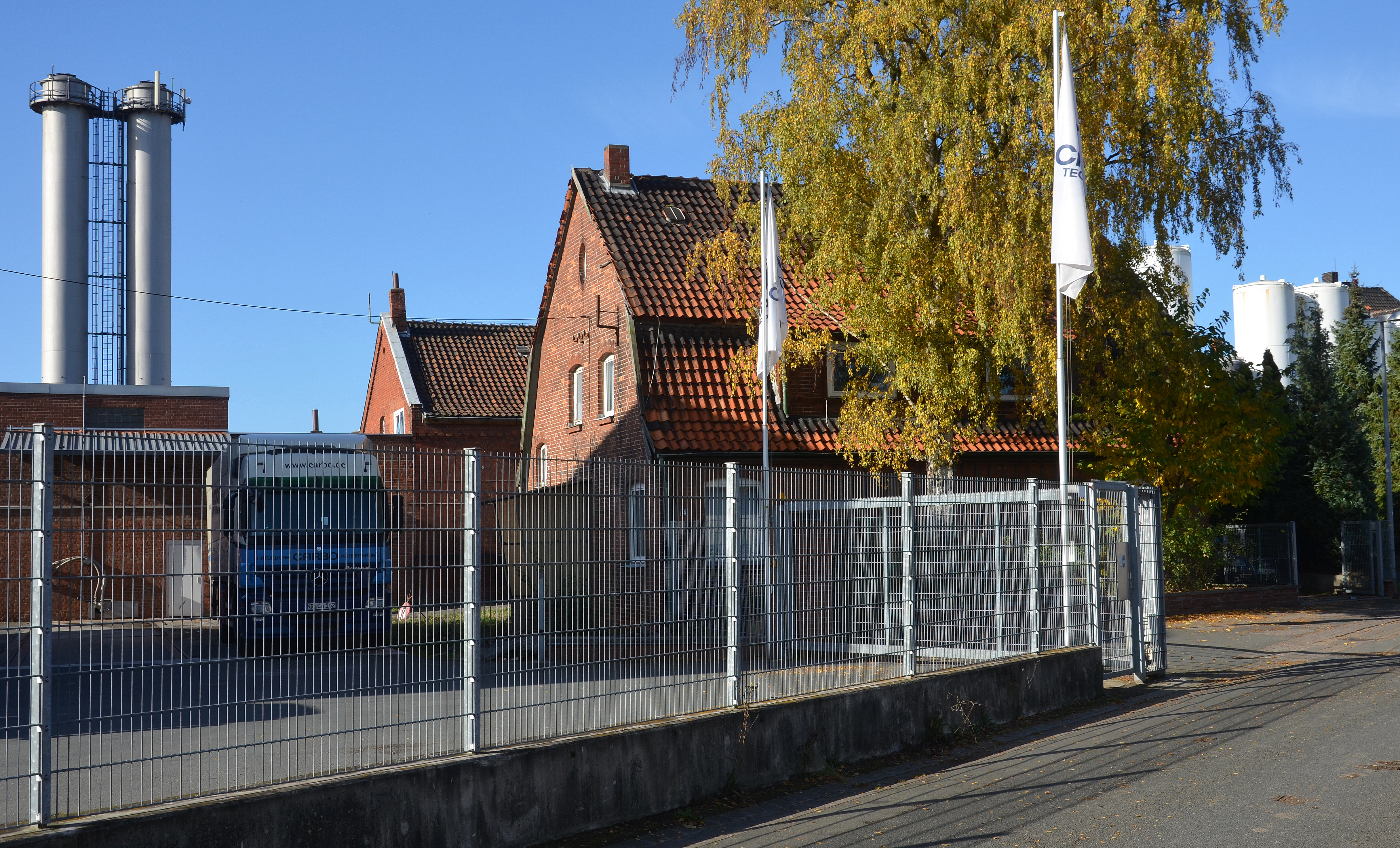 Erste Bild(ungs)-Dokumente zu dem 1902 in Rethen gegründeten heutigem Carbo Kohlensäurewerk Hannover mit Eisenbahn-Gleisanschluss und unter der Adresse Meineckestraße 12/14 in 30880 Laatzen ...